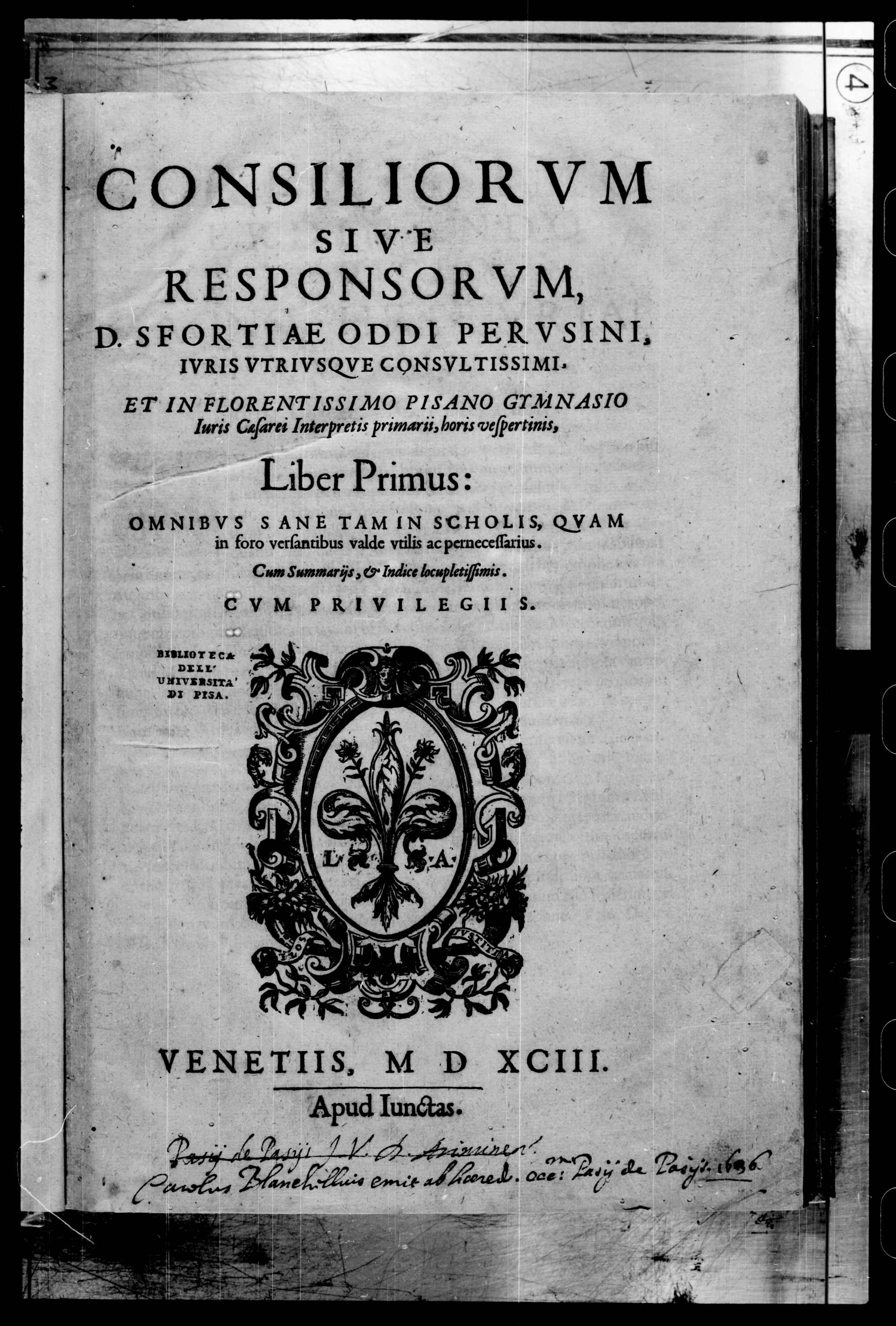 Frontespizio